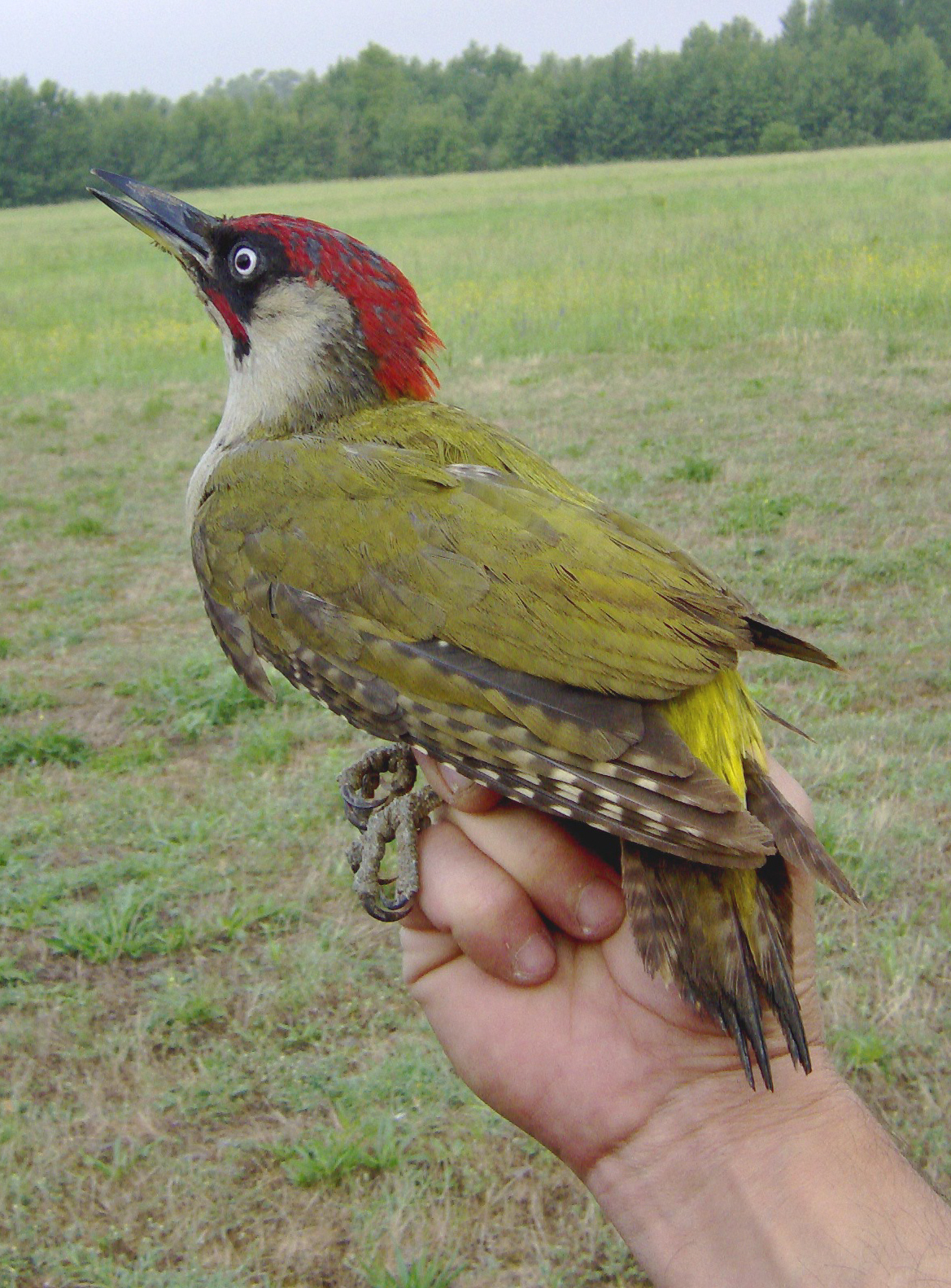 Esemplare maschio di Picus viridis (Torrente Scrivia - Centro Inanellamento Provinciale Villalvernia-Cassano Spinola